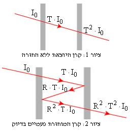 מהלך הקרניים באטלון.